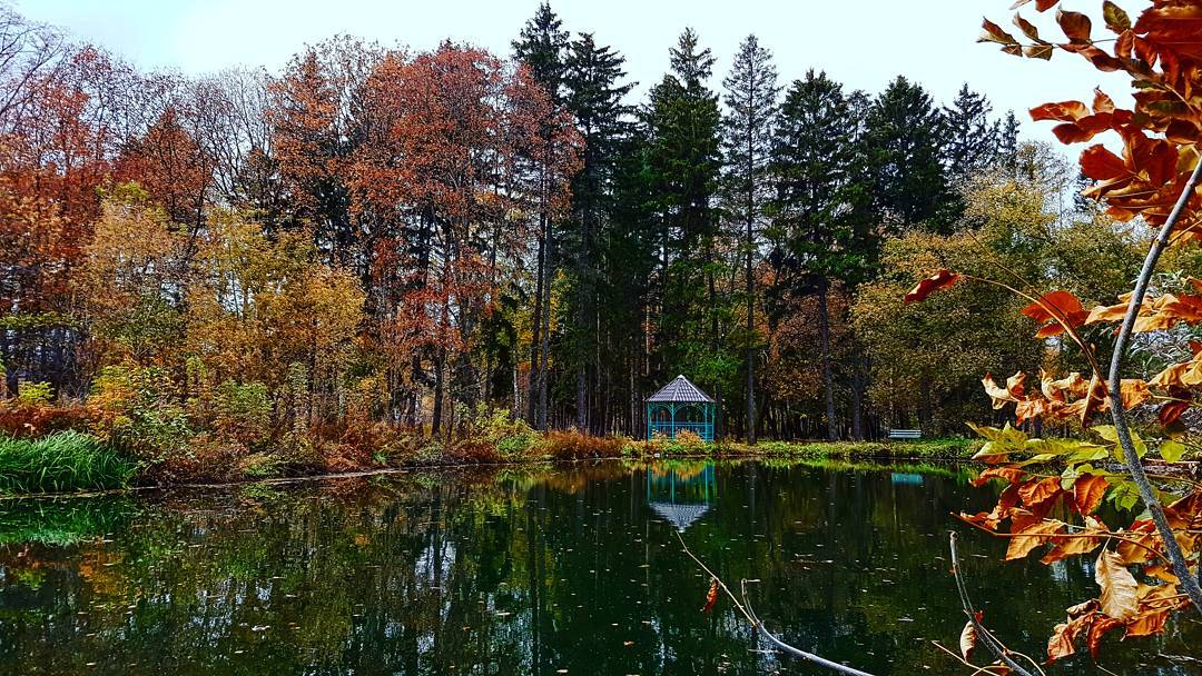 Приусадебный парк, некогда принадлежащий помещику Кривицкому, созданный на рубеже ХIХ-ХХ веков